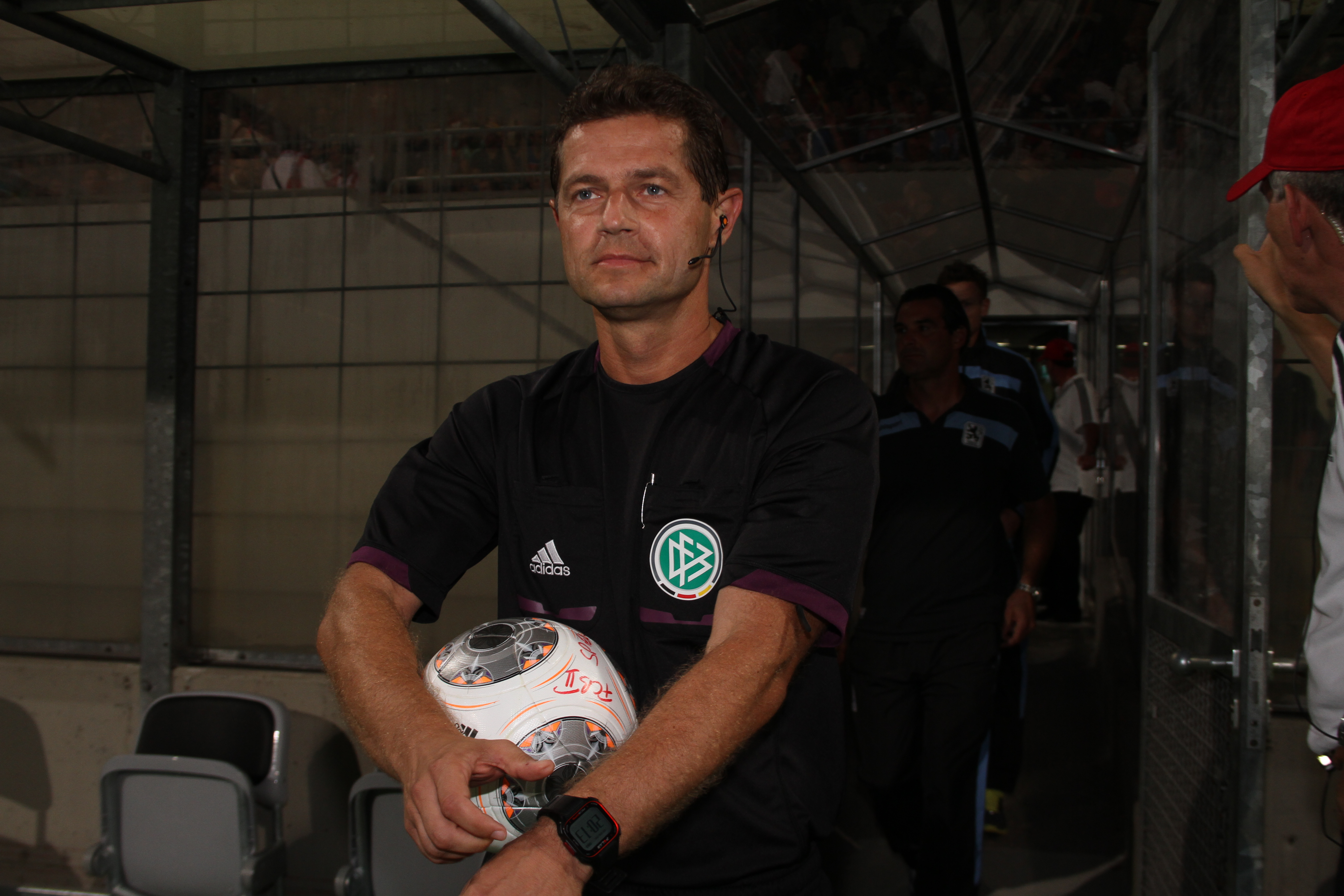 Günter Perl vor dem "kleinen" Derby zwischen den Regionalliga Mannschaften des FC Bayern und des TSV 1860 München